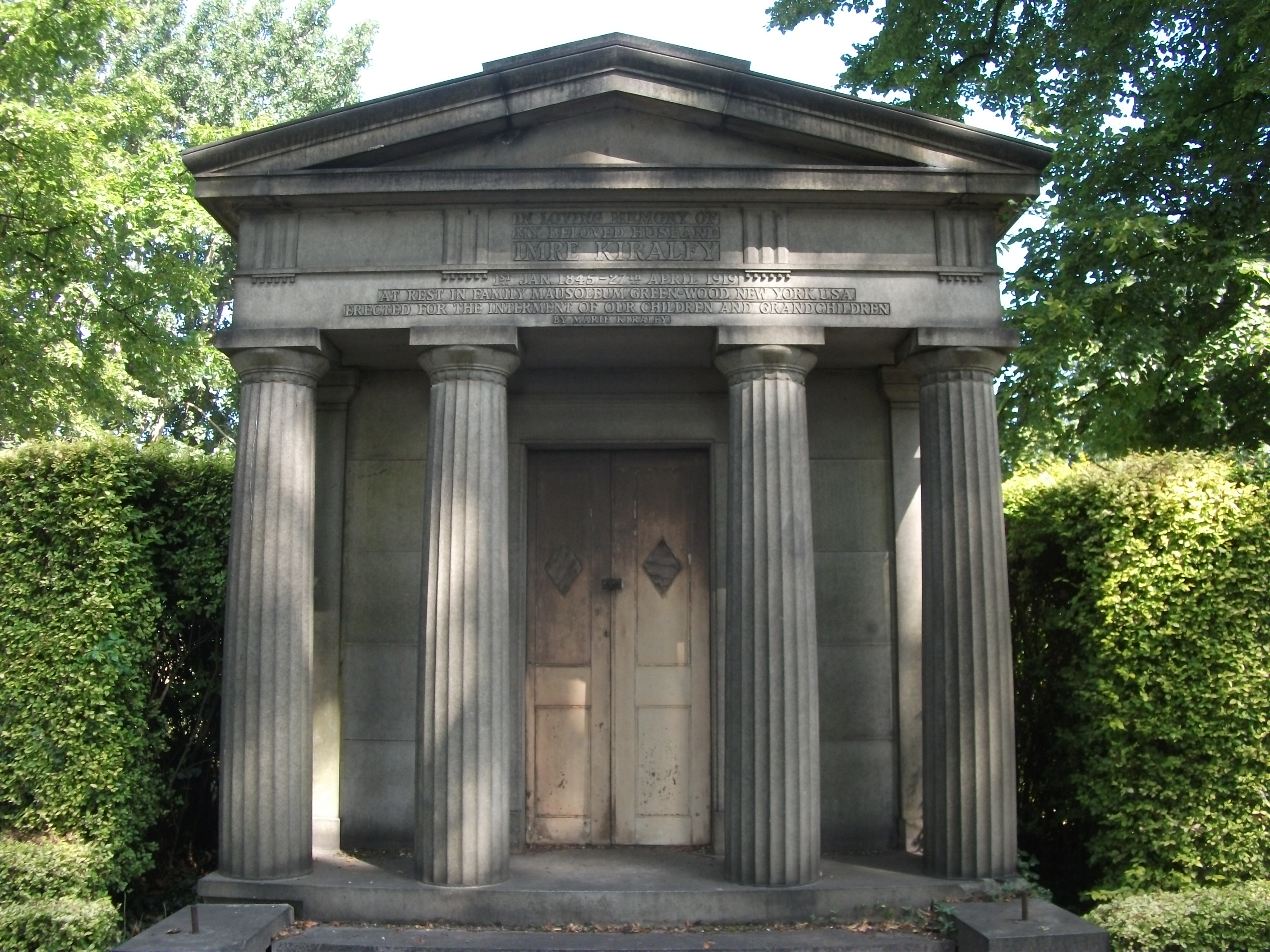 Királfy Imre londoni mauzóleuma a Kensal Green temetőben